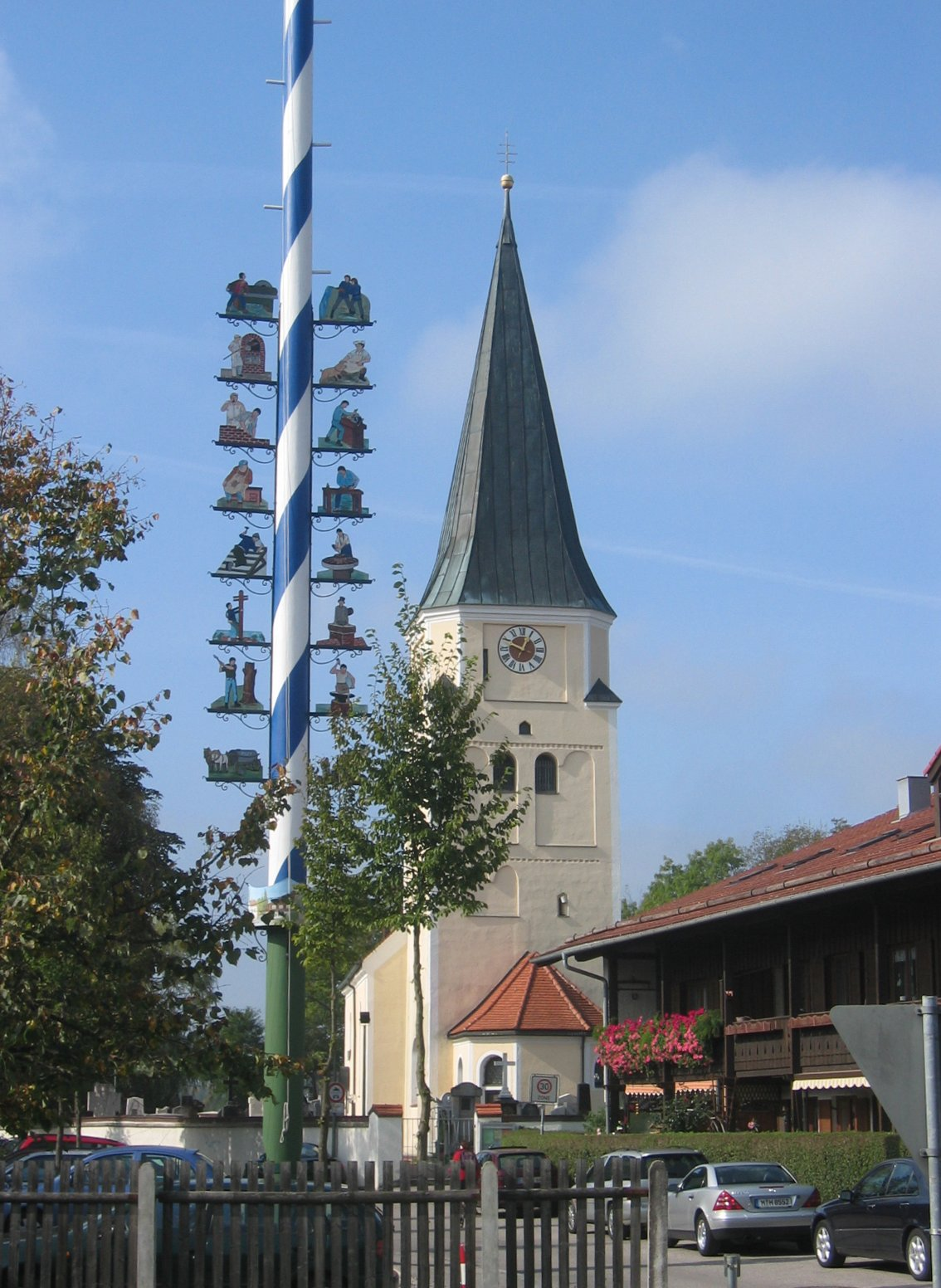 Pfarrkirche St. Johannes der Täufer, Taufkirchen, Deutschland. Selbst fotografiert 8.10.2005